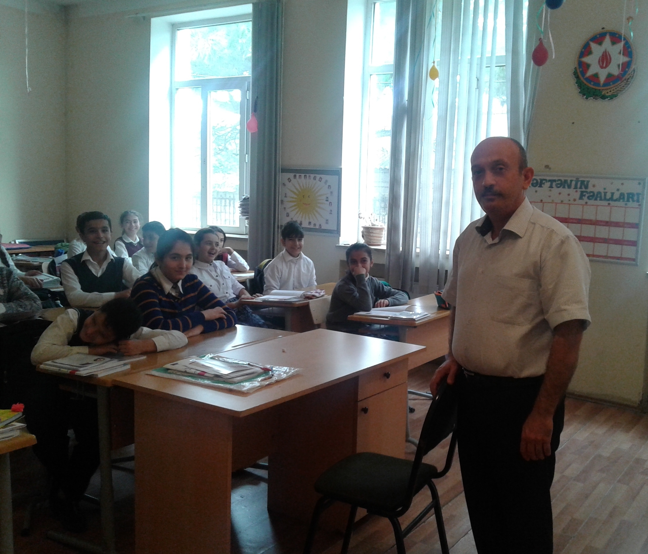 Asif Hüseynli